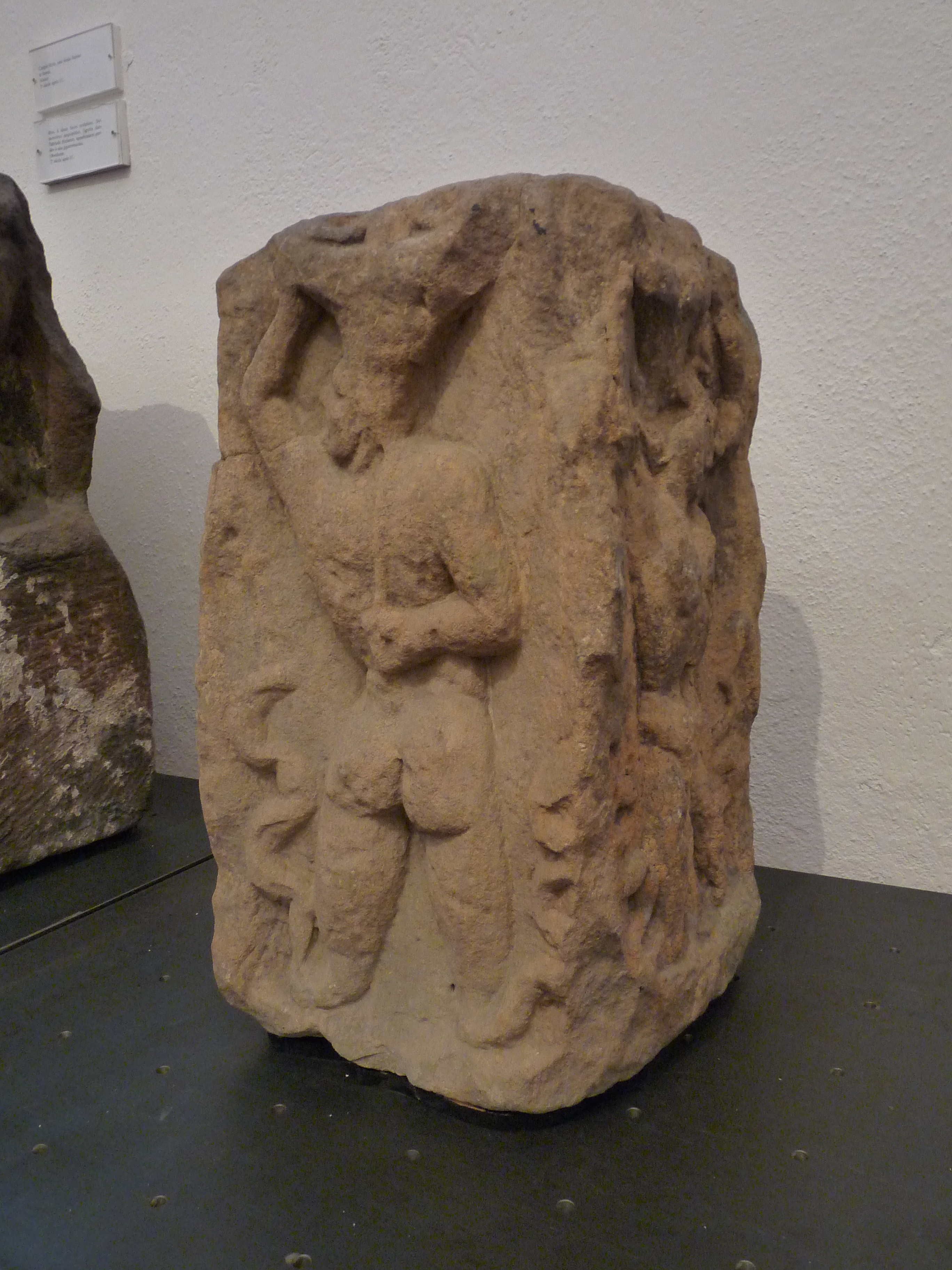 Bloc à deux faces sculptées : monstres anguipèdes figurés dans l'attitude d'atlantes. 2e siècle après JC. Trouvé à Obenheim. Musée archéologique de Strasbourg